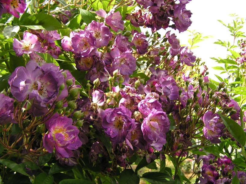 R. multiflora 'Vielchenblau'